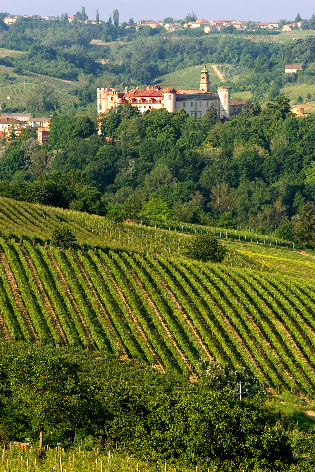 Vista del castello di Costigliole d'Asti (AT)